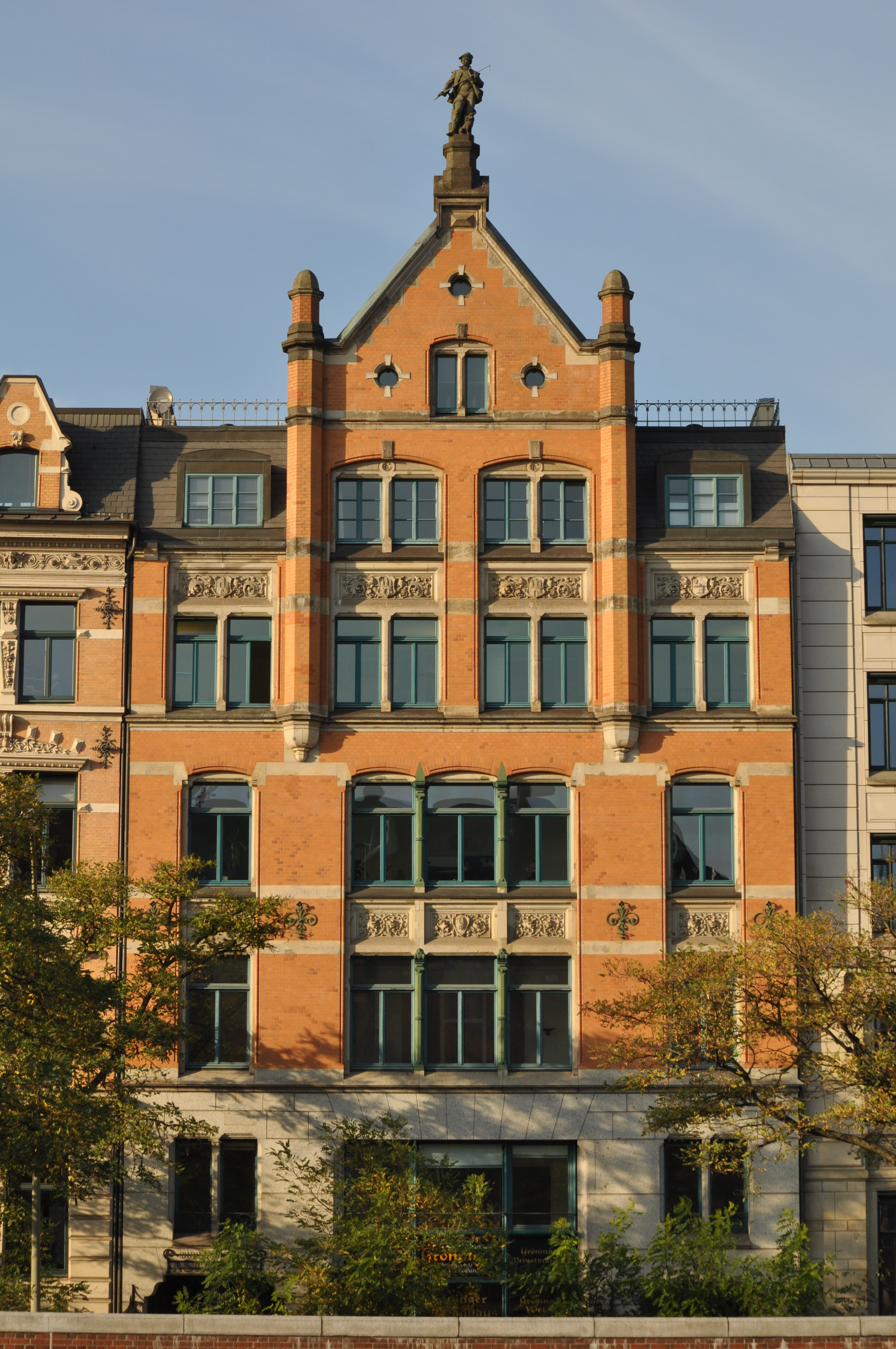 Transporthaus, Zippelhaus 4 in Hamburg-Altstadt, 1894 nach Plänen von Carl Elvers erbaut. This is a photograph of an architectural monument.